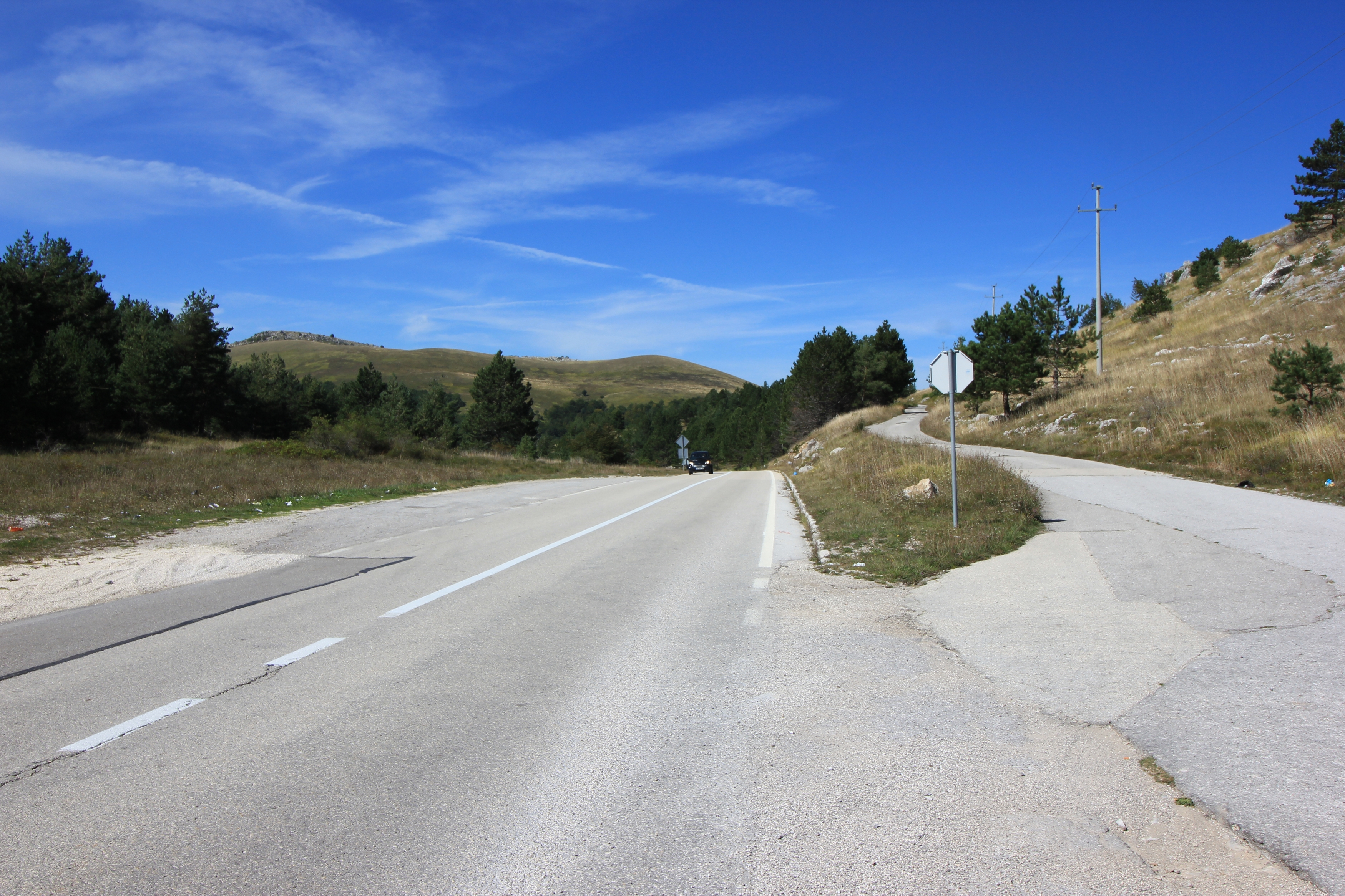 Fernstraße M14.2 zwischen Bosansko Grahovo und der kroatischen Grenze.